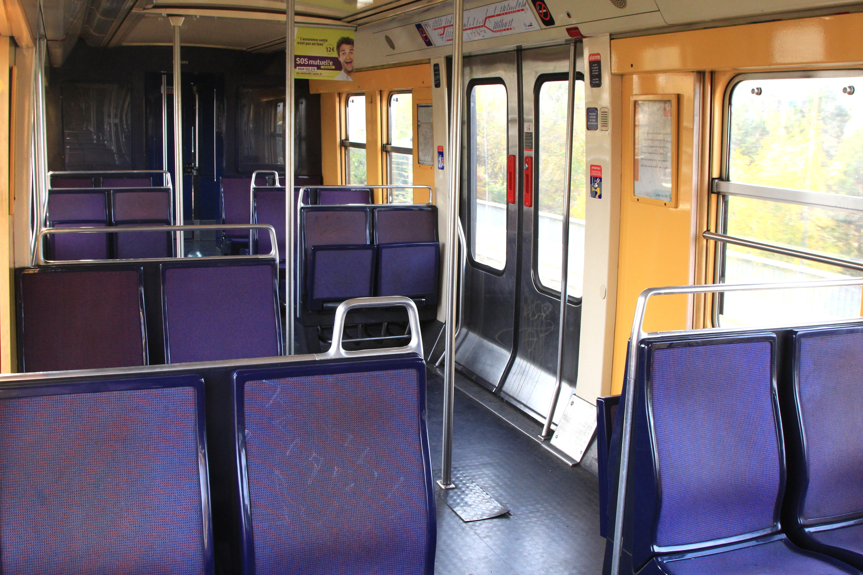 Intérieur de l'élément MI 84 ZBD 8373.